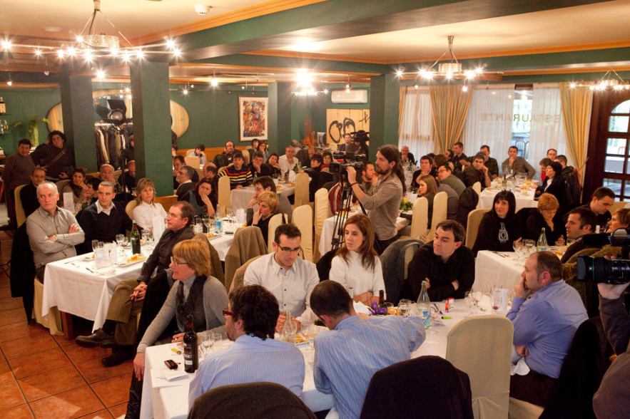 Argia Sarien banaketa-ekitaldia, Lasarten, 2010ean.